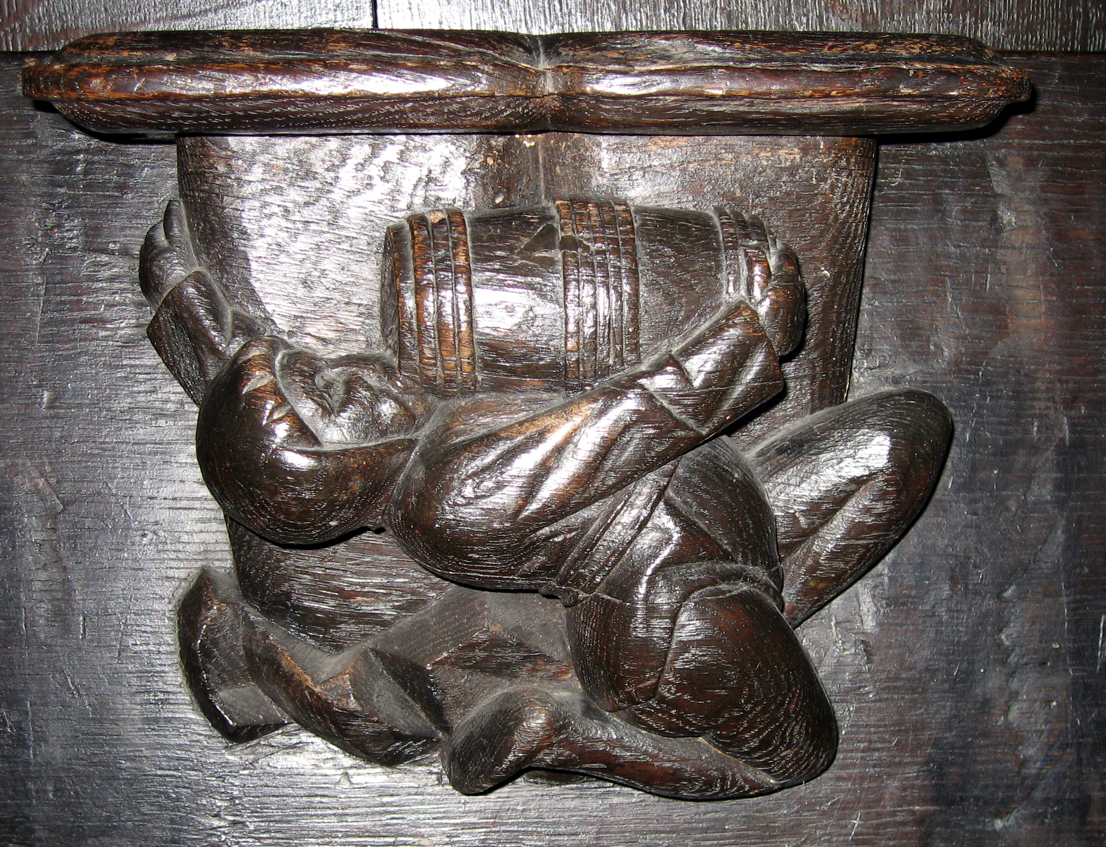 Marienkirche Dortmund, Chorgestuehl, Miserikordien, Trinker